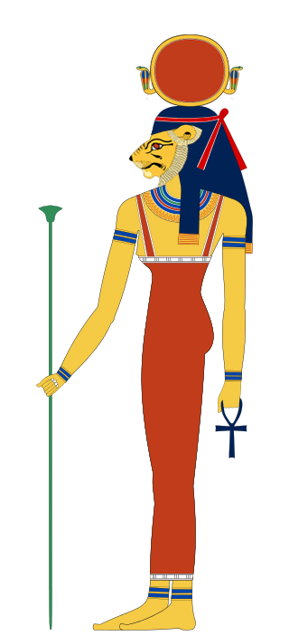 Deusa Tefnut personificação da umidade e das nuvens mitologia egípcia.